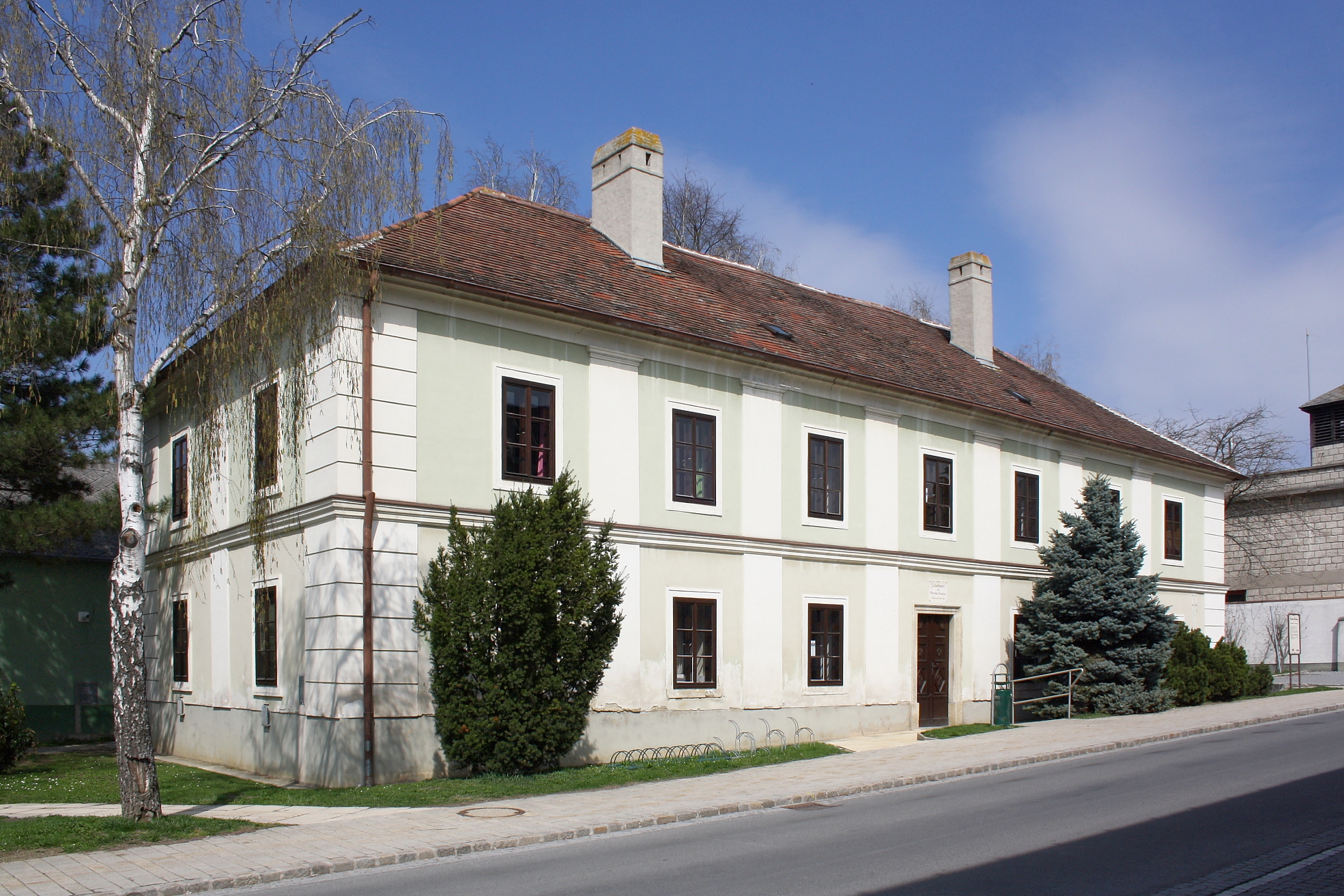 Die alte Volksschule, 1852 erbaut, in der burgenländischen Marktgemeinde Hornstein.